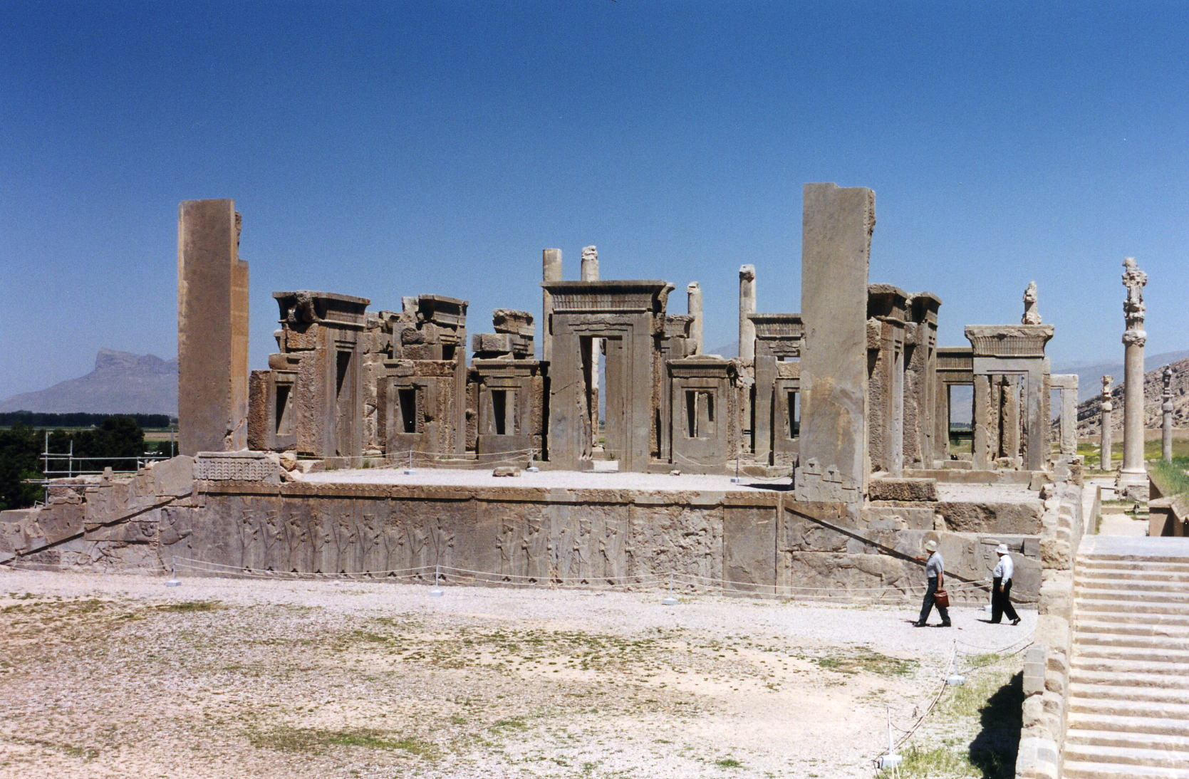 Persépolis (Iran). Le Palais de Darius Ier. VIe-Ve s. av. J.-C. Photo Ginolerhino 2002.